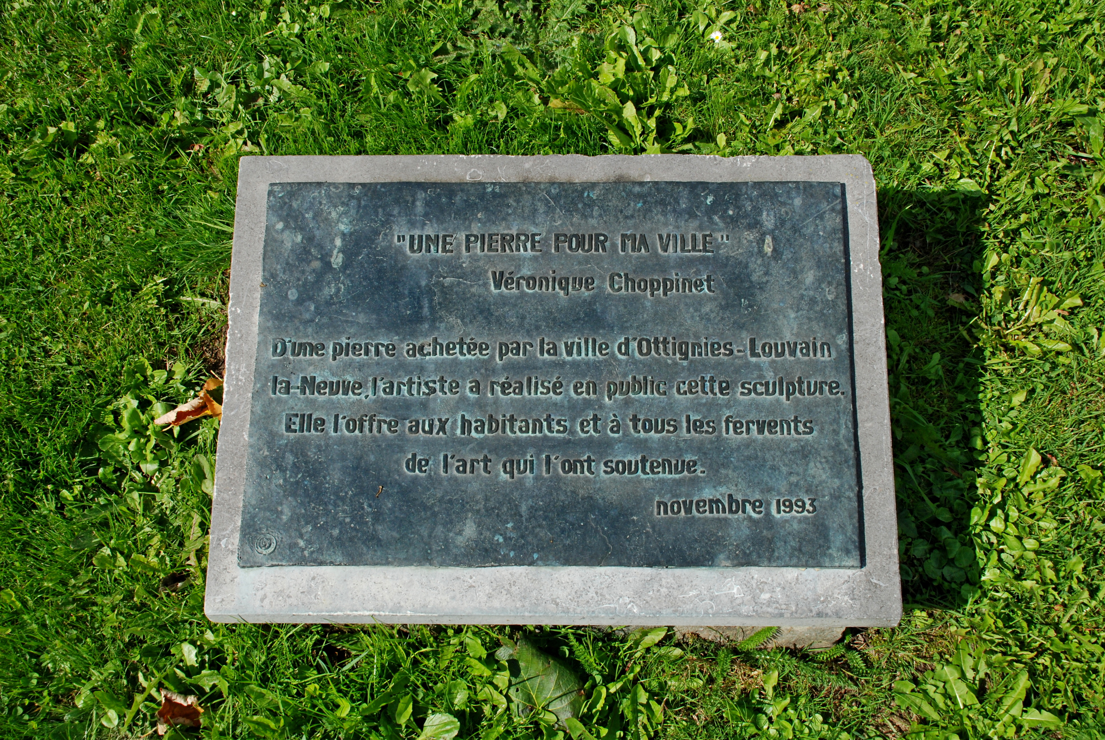 Belgique - Brabant wallon - Ottignies - Une pierre pour ma ville (Véronique Choppinet - novembre 1993)